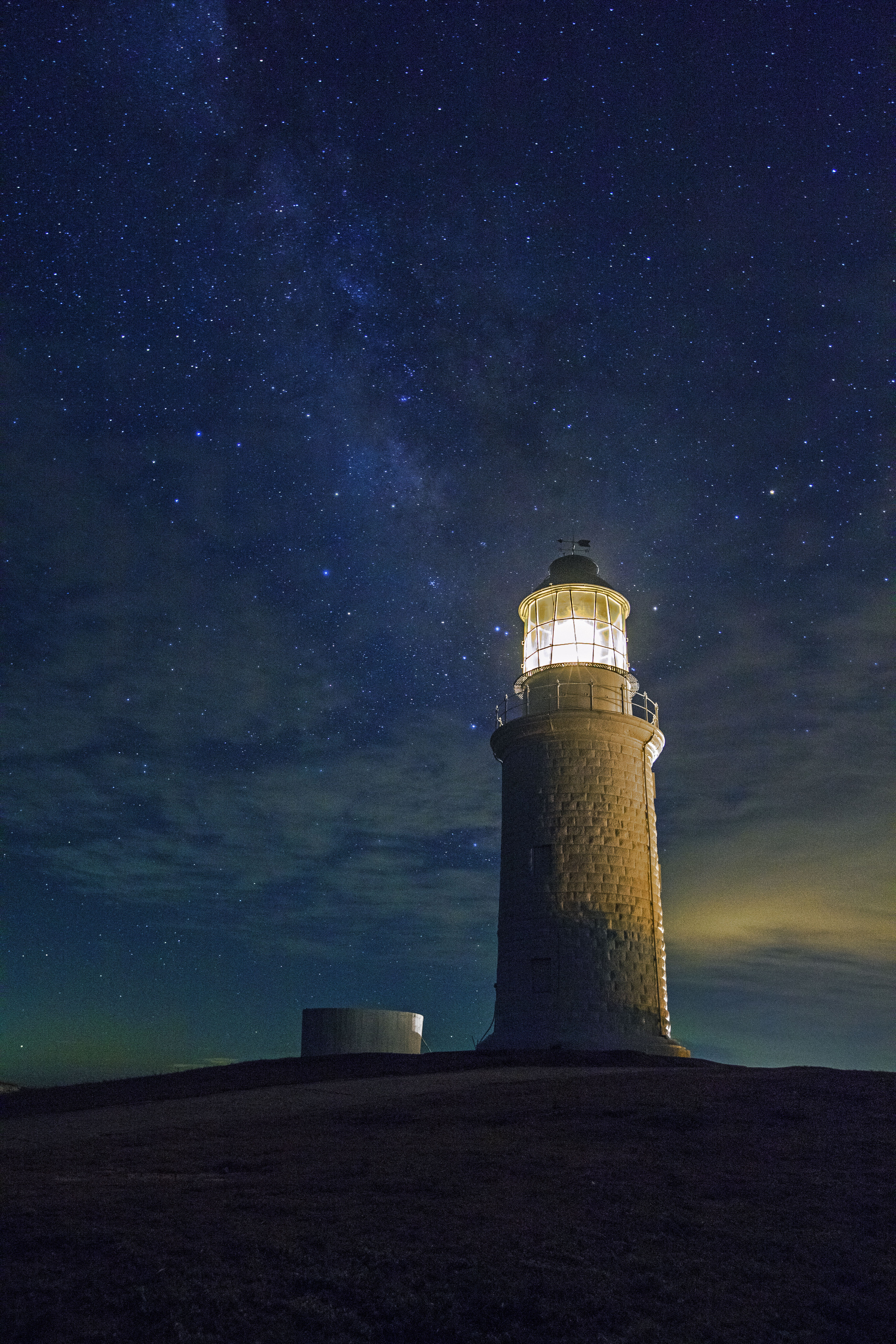 夜空下的東犬燈塔